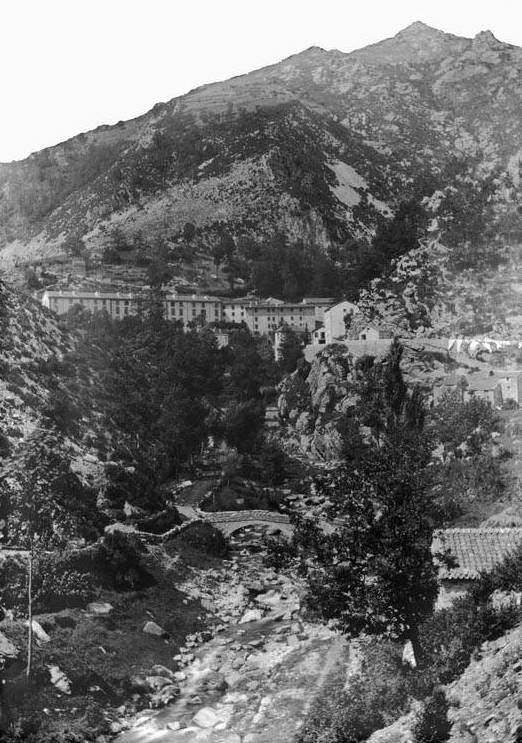 Imatge